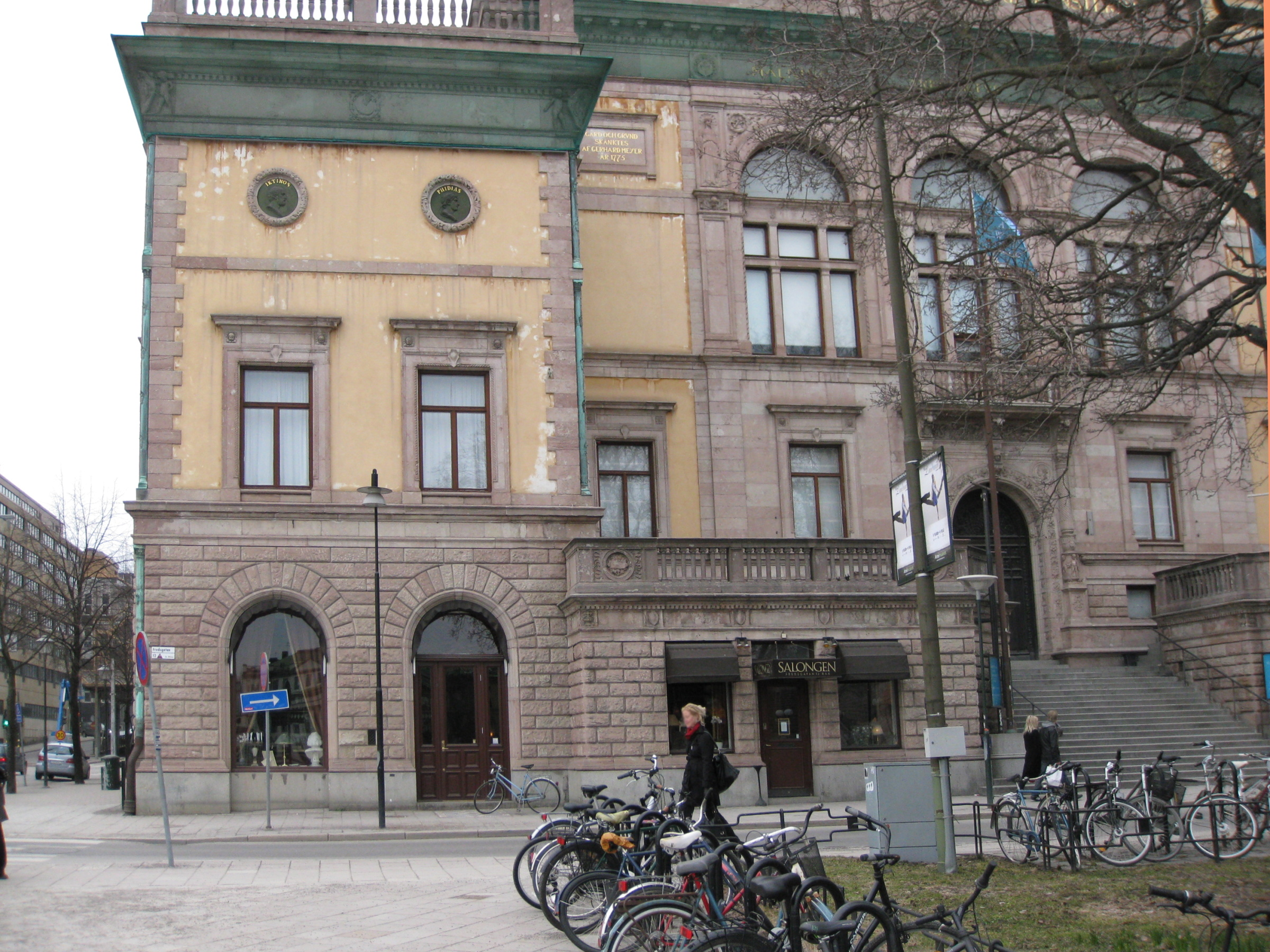 Salongen, Fredsgatan 12, Stockholm